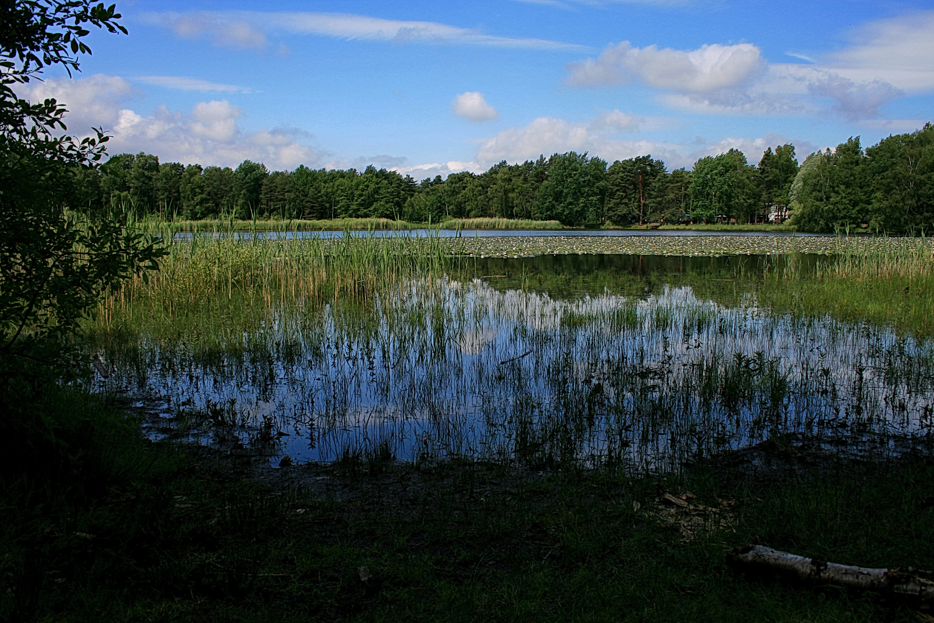 Würmsee in Kleinburgwedel (Burgwedel), Niedersachsen, Deutschland